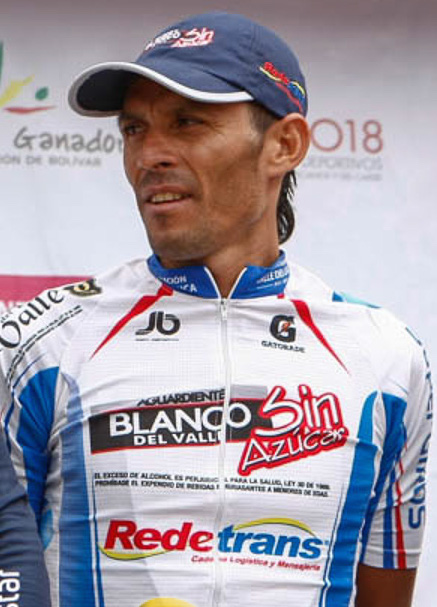 Etapa 10 CRI Subachoque – Cajicá (24,3 Kms). Domingo 5 de octubre de 2014